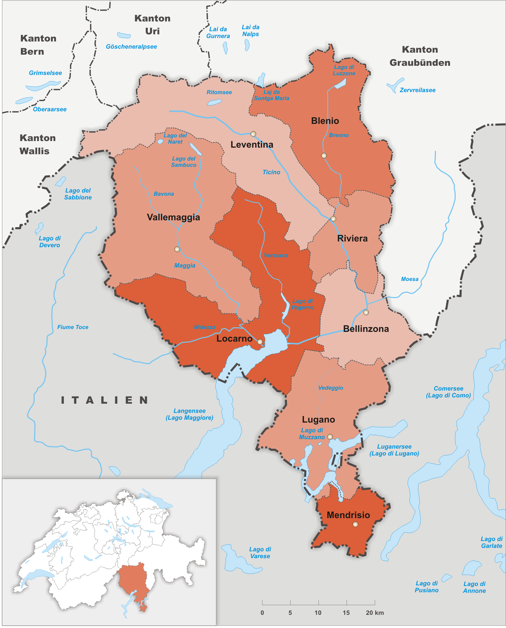 Bezirke des Kanton Tessin